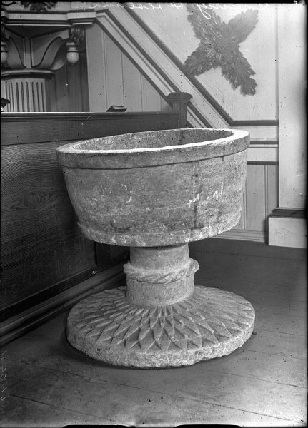 Dopfunt av täljsten, snabbinv. Kategori: (04) Dopfuntar Dopfunt av täljsten, snabbinv.